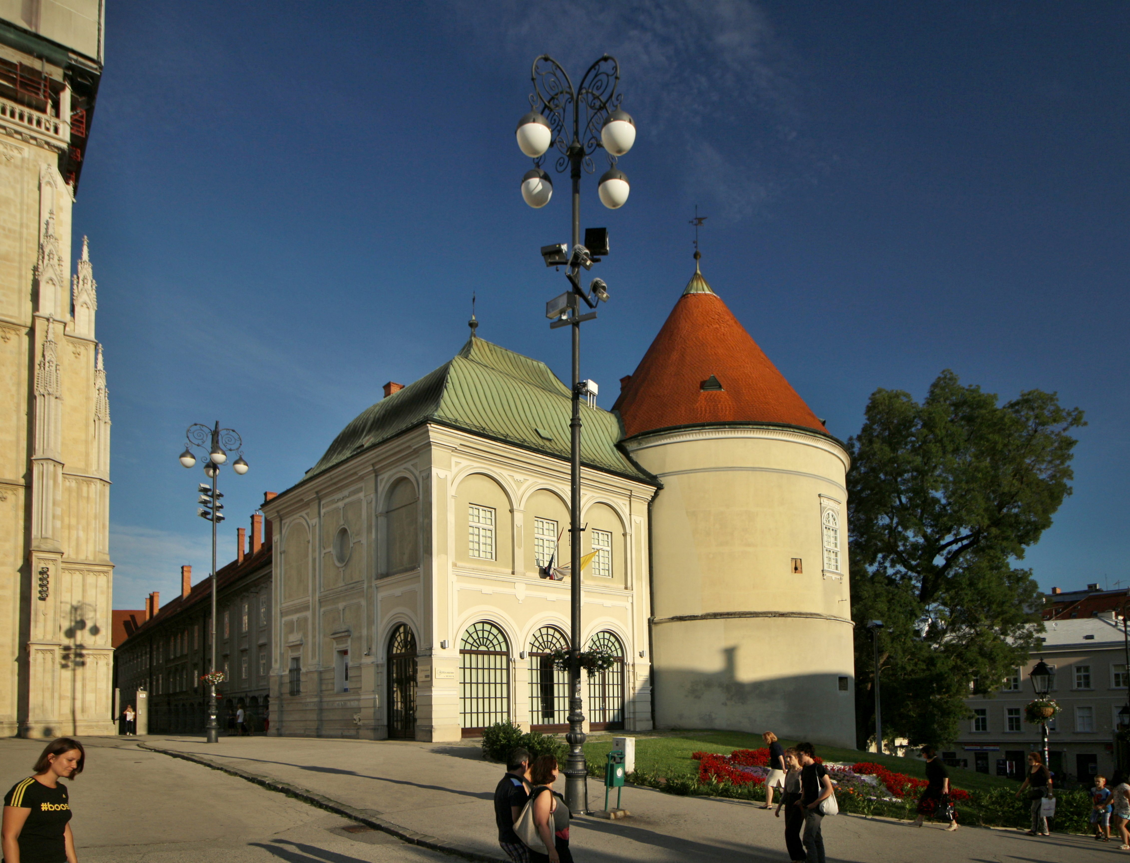 Záhřeb, Kapitol, katedrála a okolí